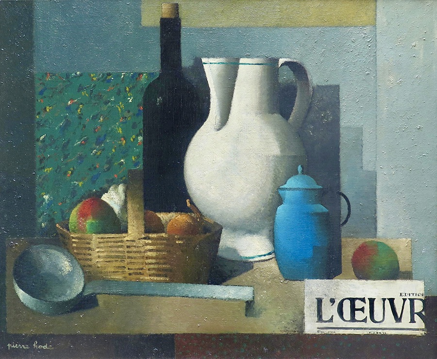 nature morte, cubisme